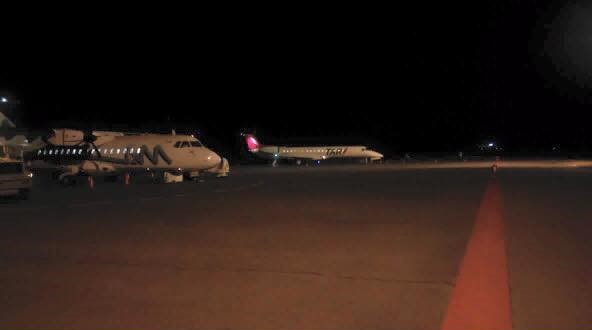 pista aeropuerto tpq